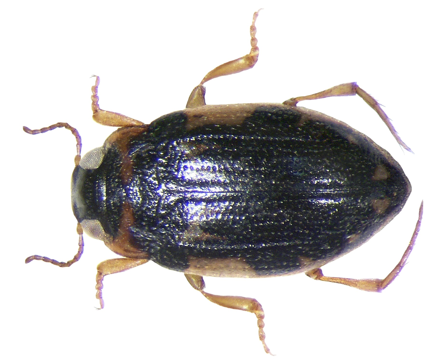 Yolina elegantula (Boheman, 1848) Familie: Dytiscidae Grösse: 2,4 mm Verbreitung: Westafrika, Ostafrika Fundort: Südafrika, Mpumalanga leg. A.Skale, 2001; det. Hendrich Foto: U.Schmidt, 2007